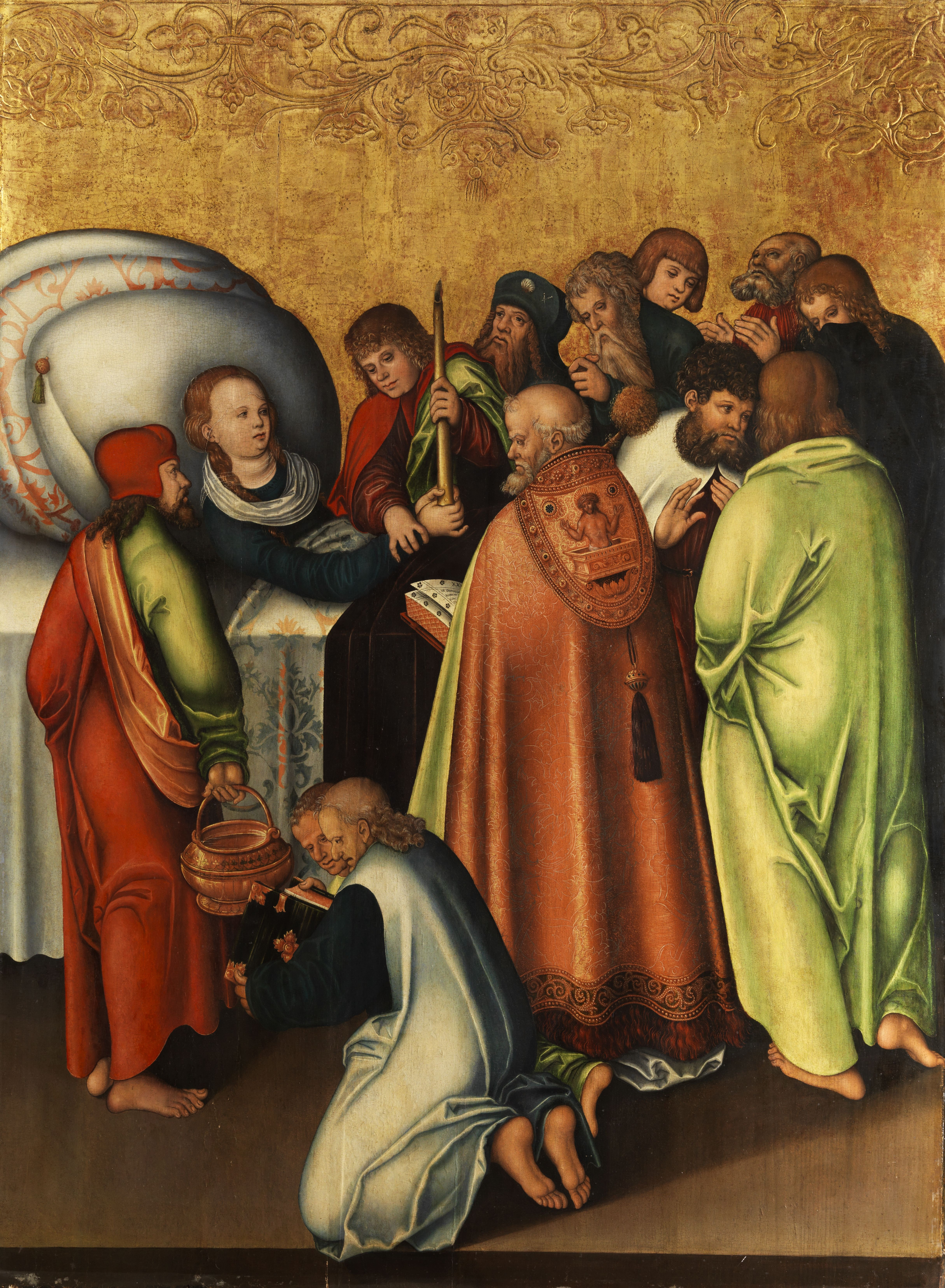 Ehemals für einen Altar geschaffenes Tafelgemälde